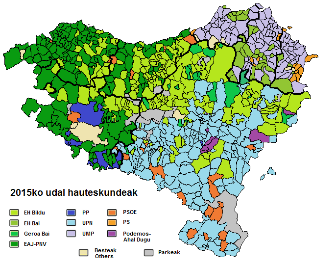 2015ko udal hauteskundeak